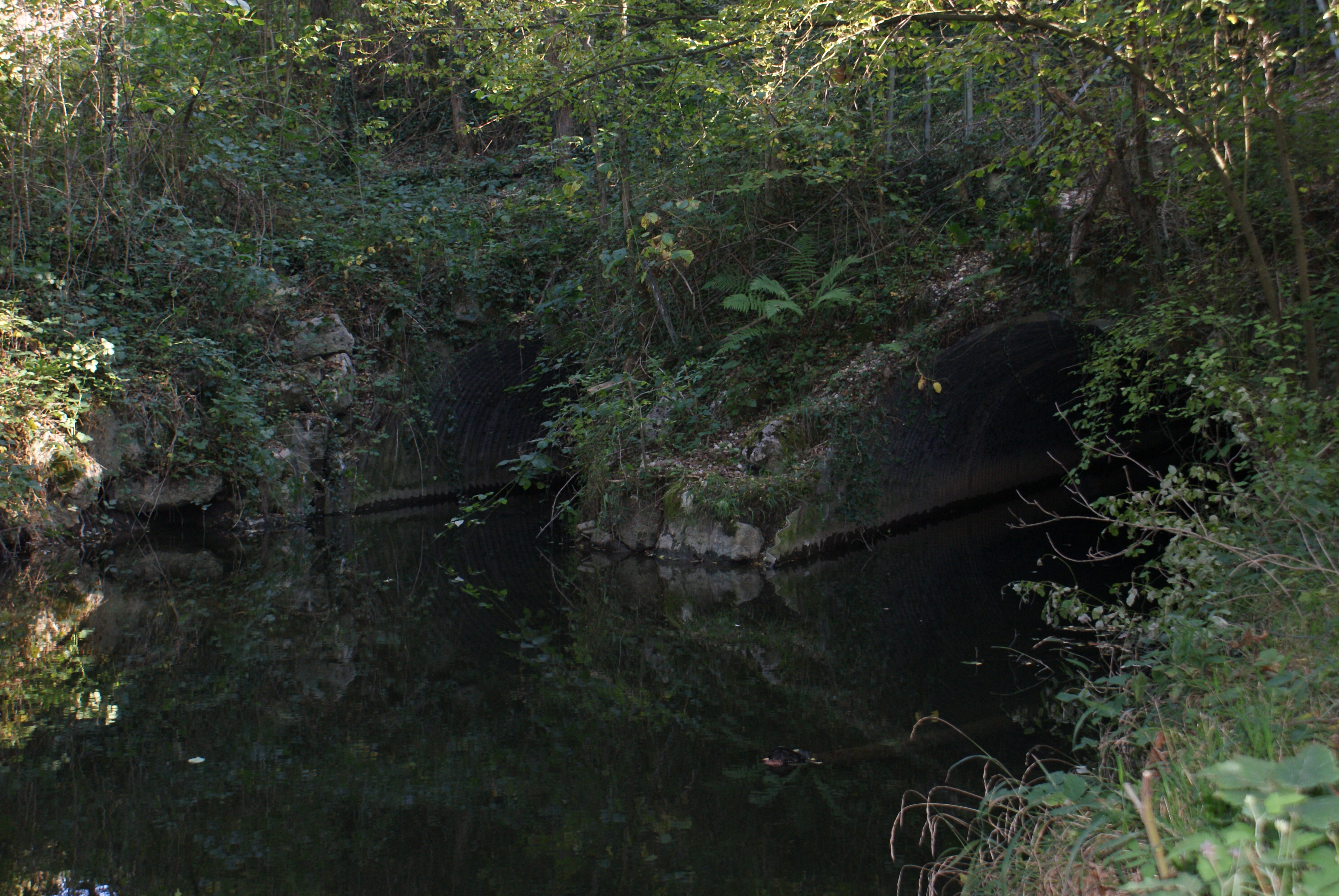 La Bourbre à La Bâtie Montgascon